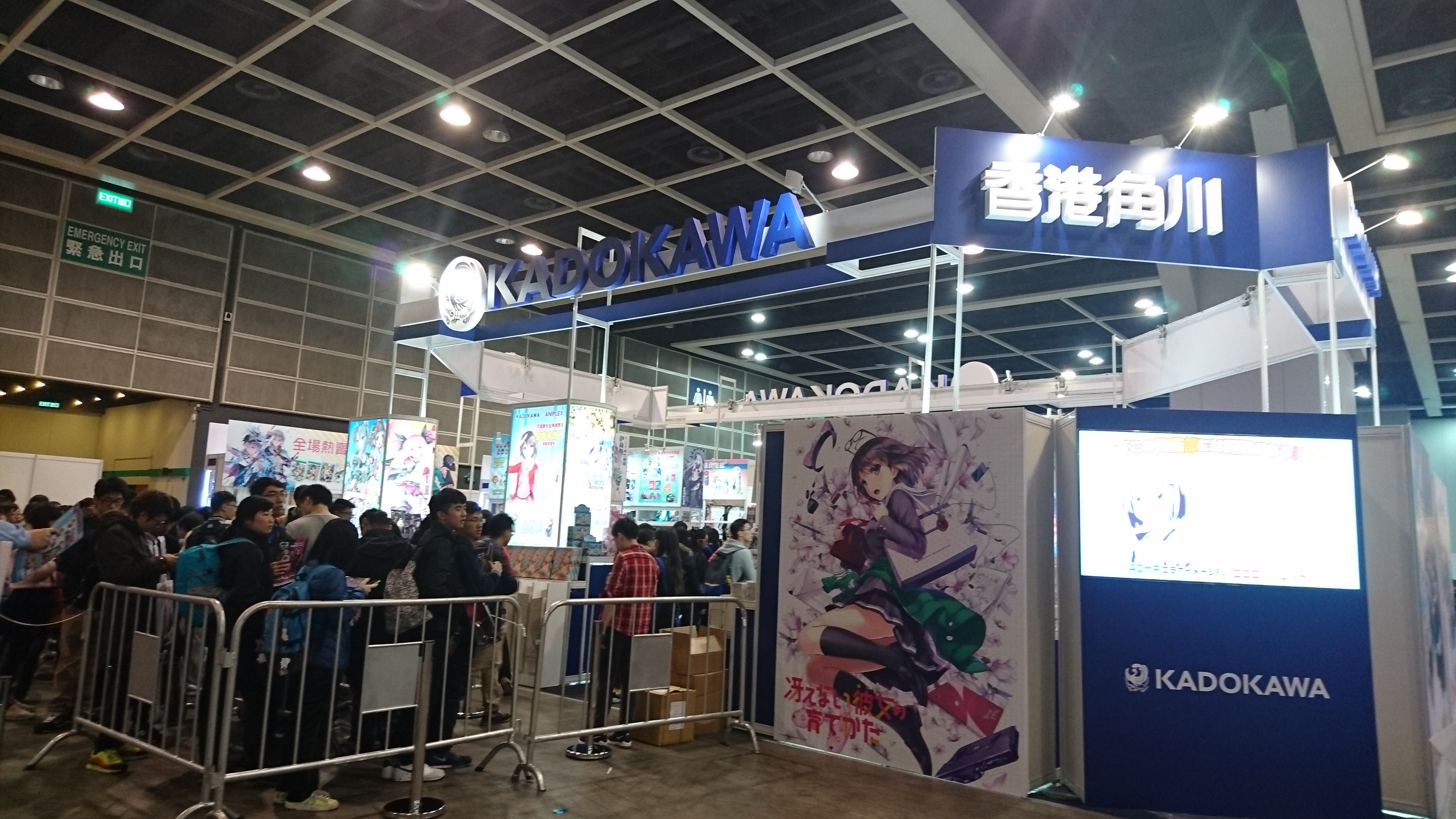 C３会場にある商業ブーズ